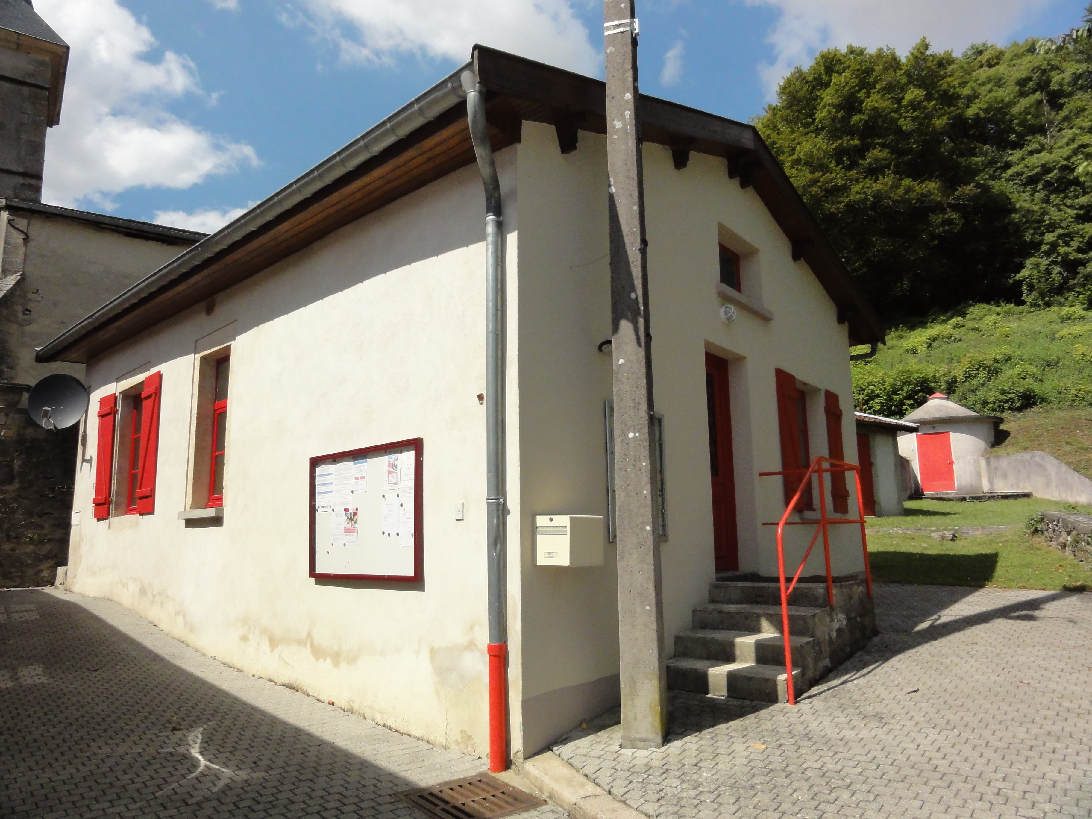 Géry (Meuse) mairie